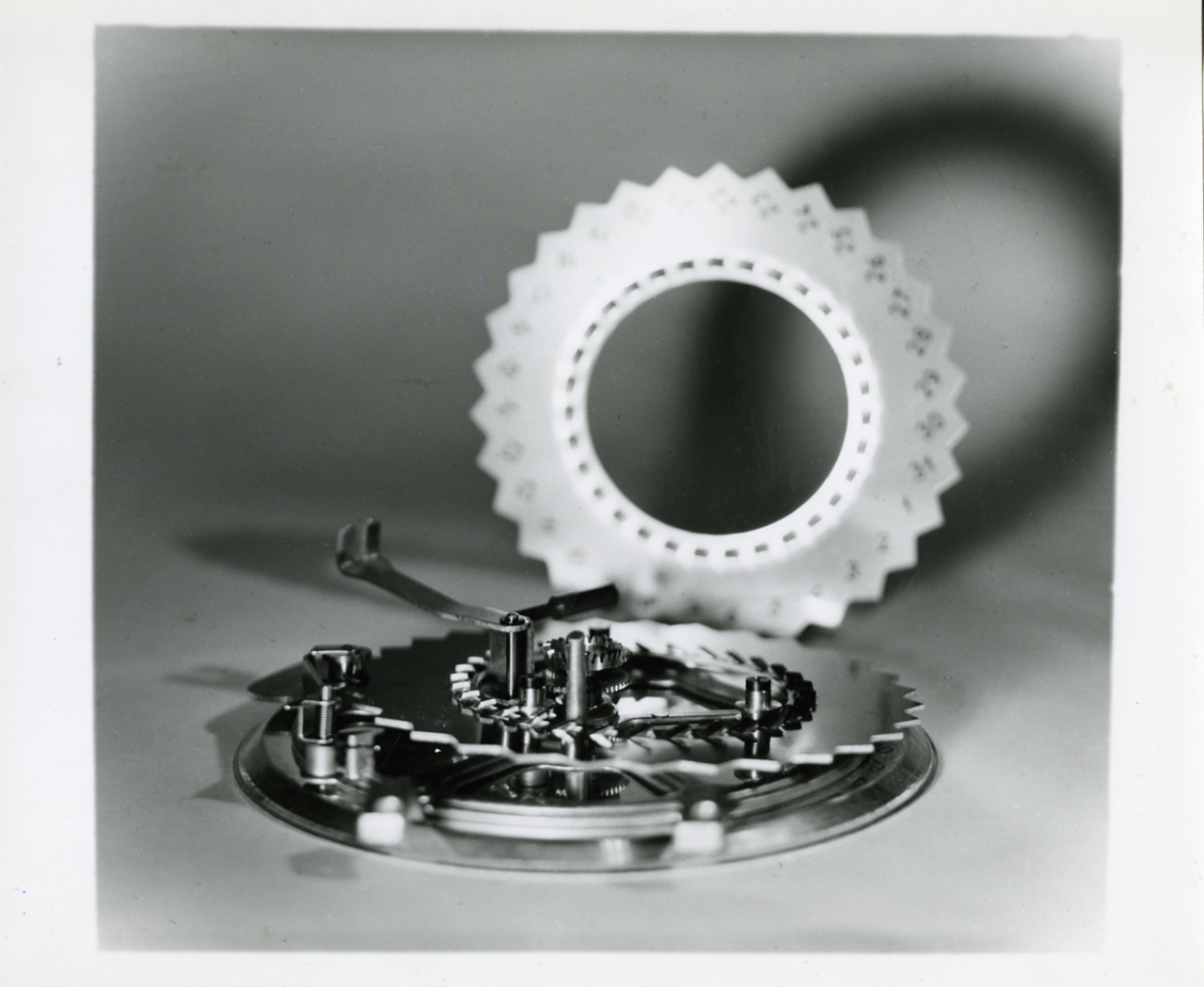 Servizio fotografico : Italia, 1965 / Paolo Monti. - Stampe: 10 : Positivo b/n, gelatina bromuro d'argento/ carta, 24x30. - ((Al verso delle stampe timbro a inchiostro con copyright (Via Colonna - Milano). - Sul coperchio della scatola iscrizione didascalica manoscritta a pennarello nero: "Codussi (Arch.) 1".